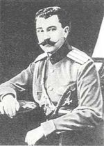 Головин, Николай Николаевич (1875-1944) - русский генерал, видный военный теоретик, коллаборационист